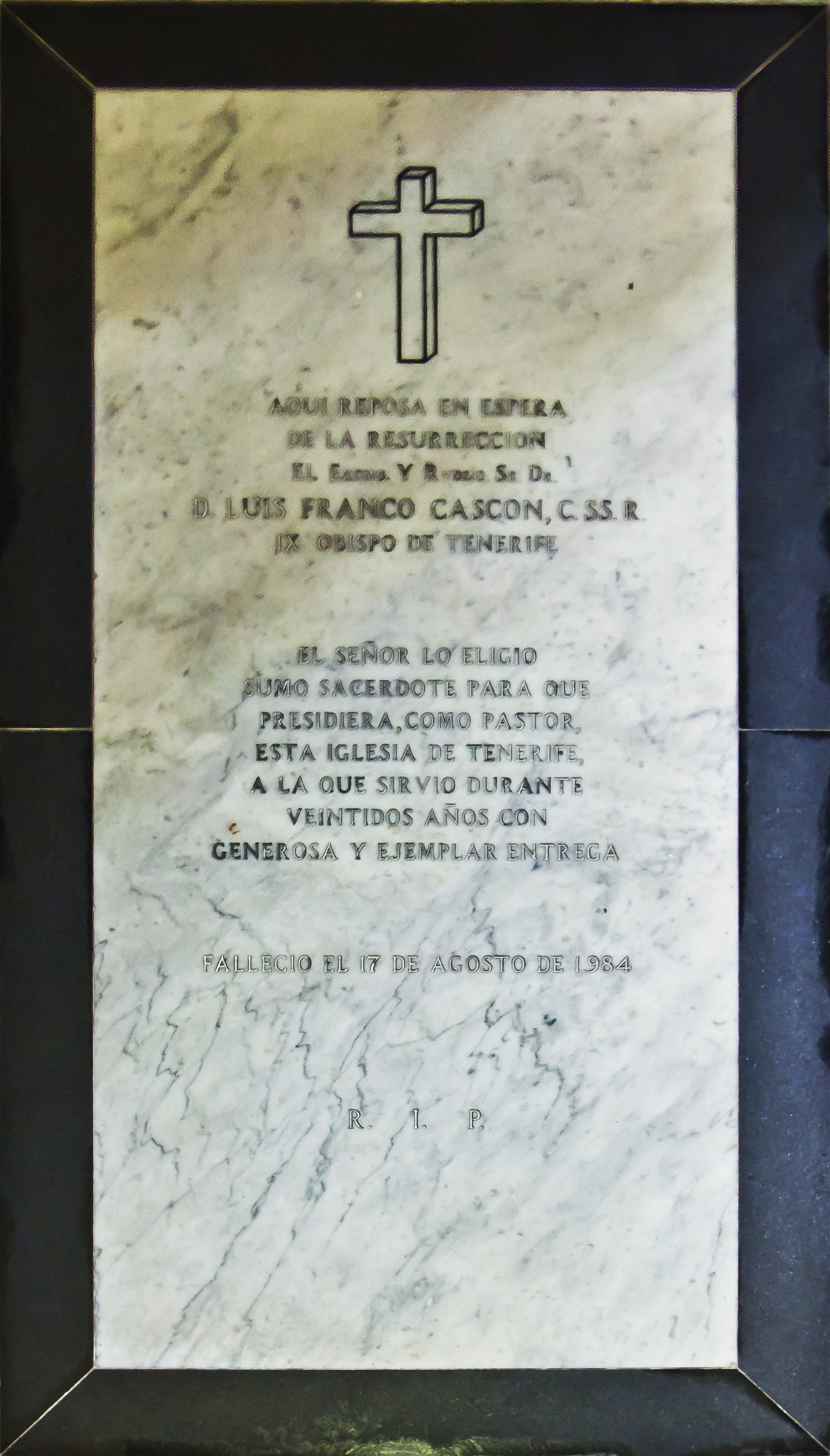 Grabplatte für den Bischof Luis Franco Cascon